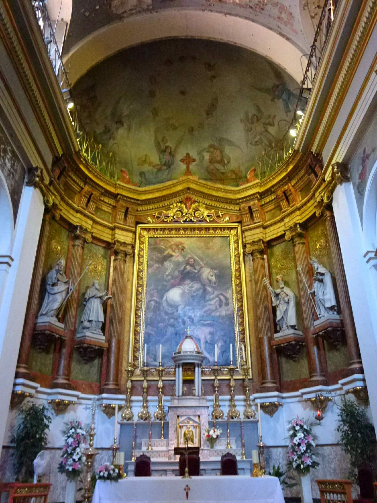 Iglesia de Santiago y San Juan Bautista (Madrid)